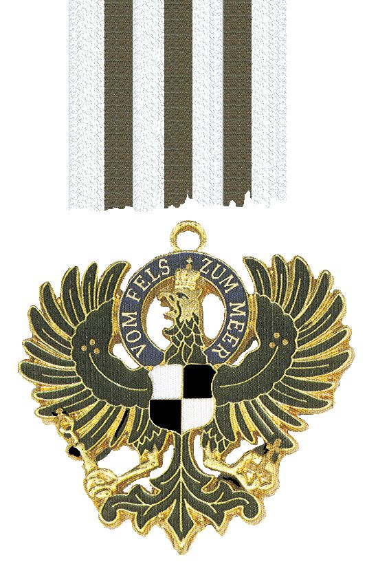 Scan. Particuliere verzameling Groningen.(mijn eigen verzameling) Robert Prummel 2007